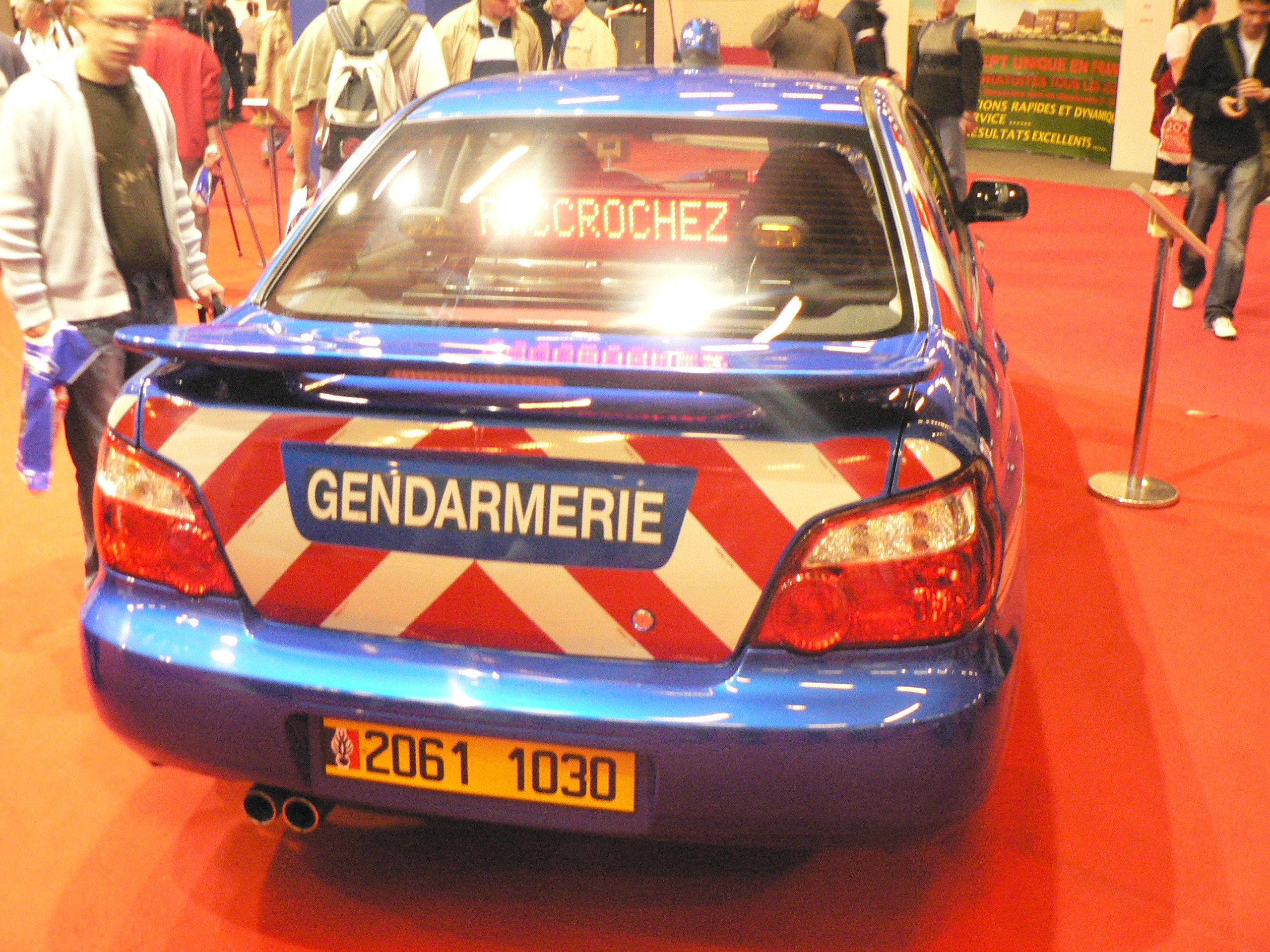 Mondial de l automobile de Paris (October 2006)